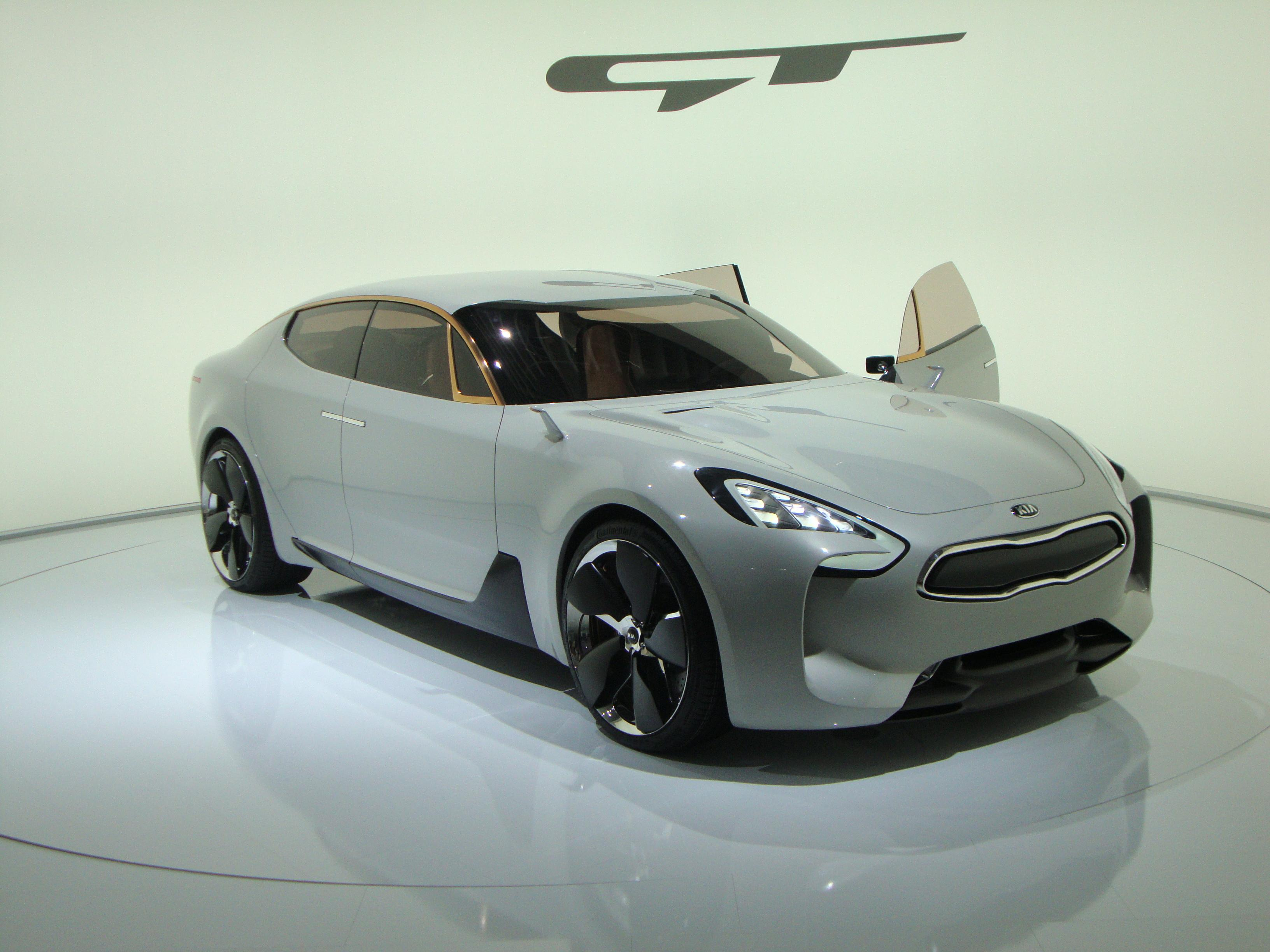 IAA Frankfurt